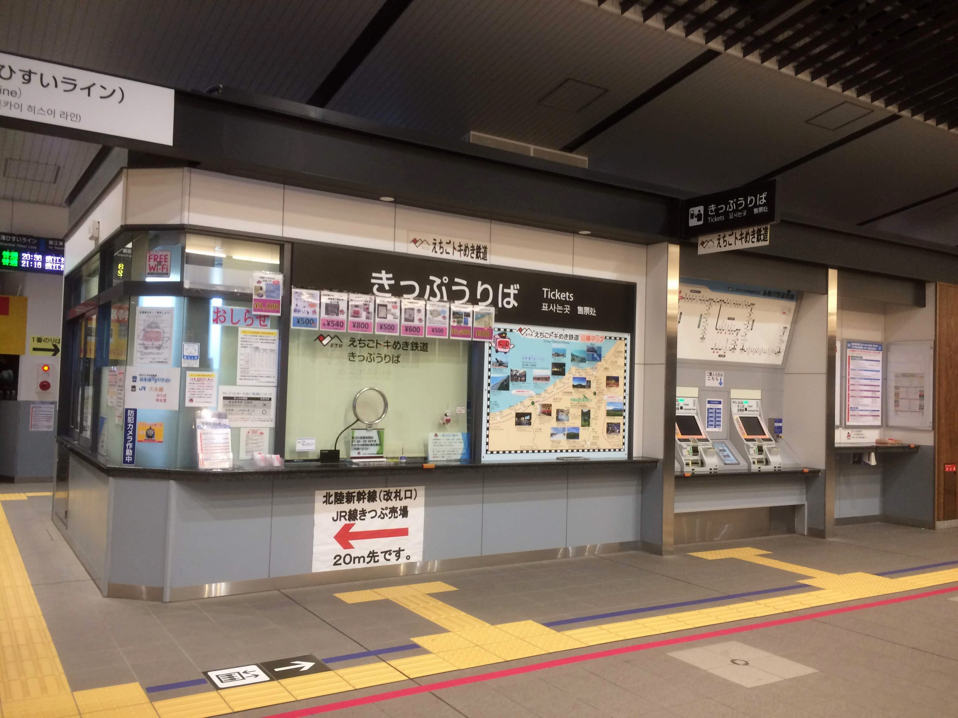 ETR糸魚川駅の改札口・窓口・自動券売機